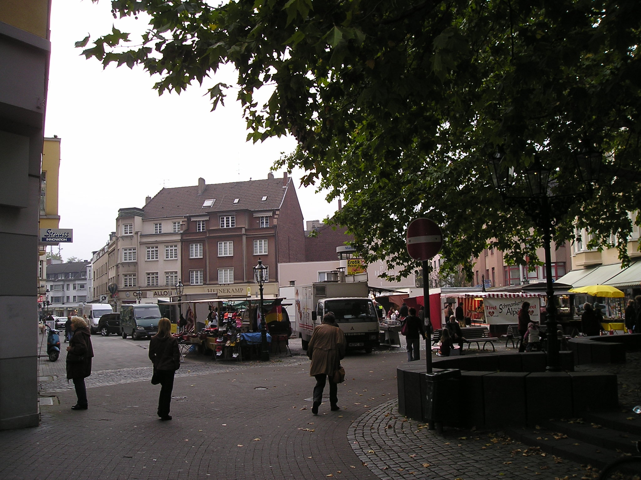 Market in Düsseldorf-Benrath